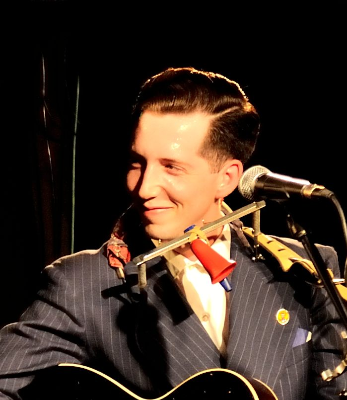 En concert à Reutlingen/Germany le 2 Mai 2012